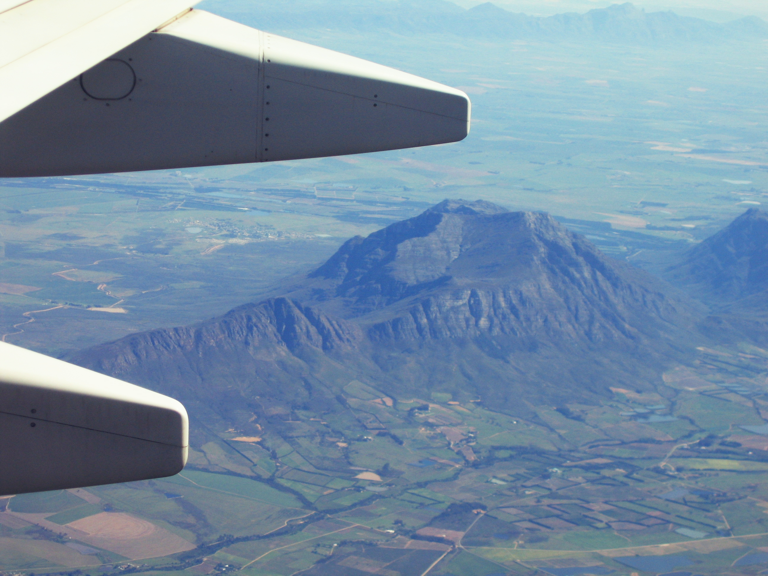 La Montagne de la table, Cap-Occidental, en Afrique du Sud This is an image with the theme "Africa on the Move or Transport" from: South Africa